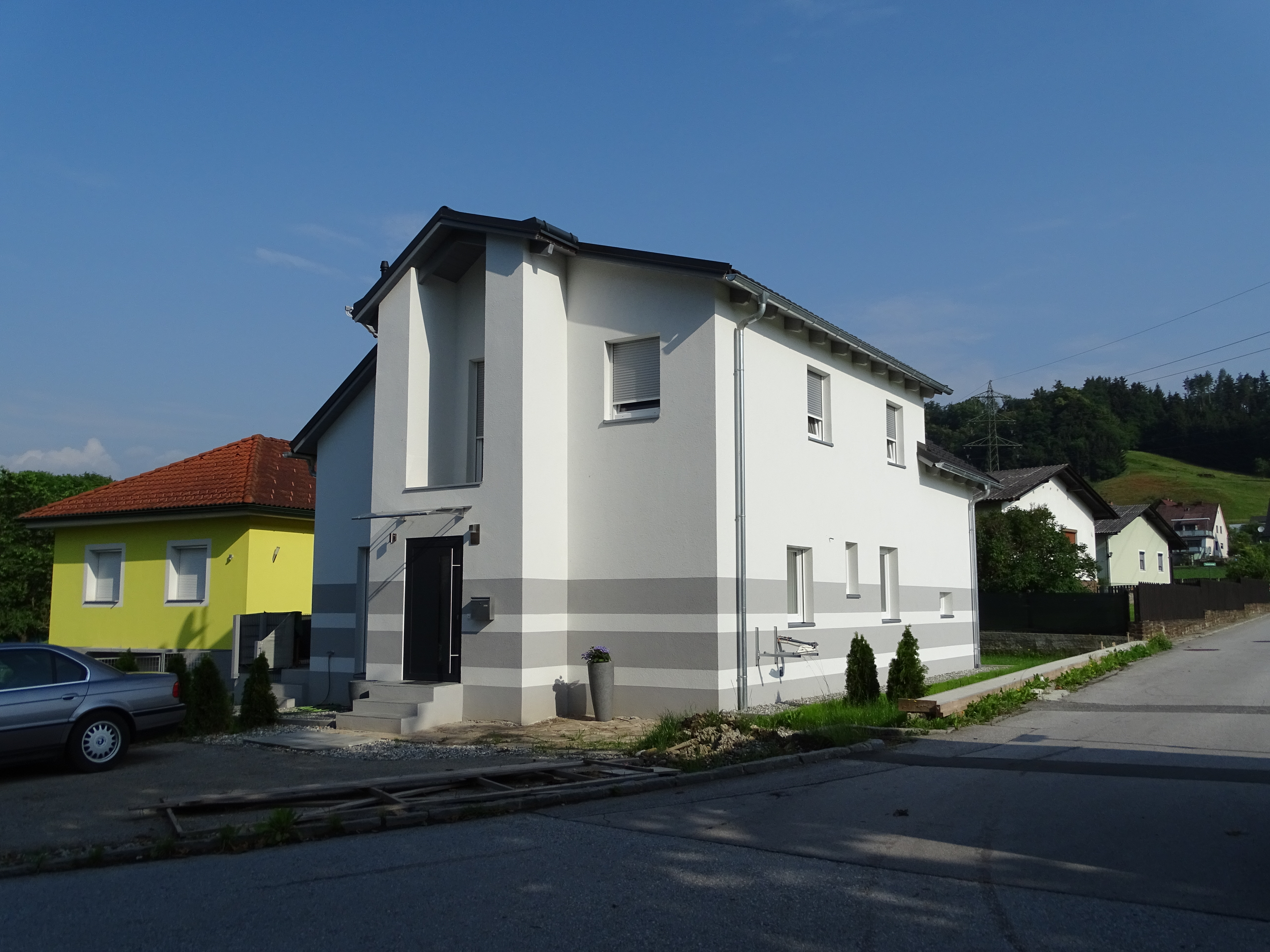 Die ehemalige Evang. Filialkirche, Evangelische Michaelskirche A. B. im Juni 2018. Jetzt Wohnhaus.